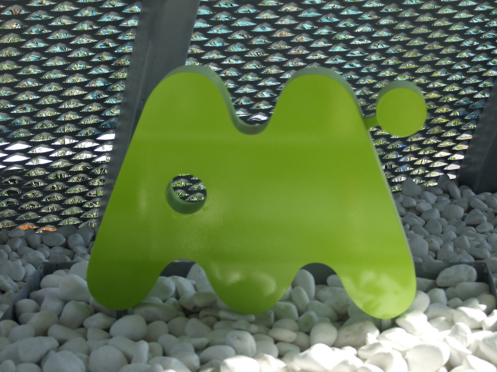 Símbolo de Aramón